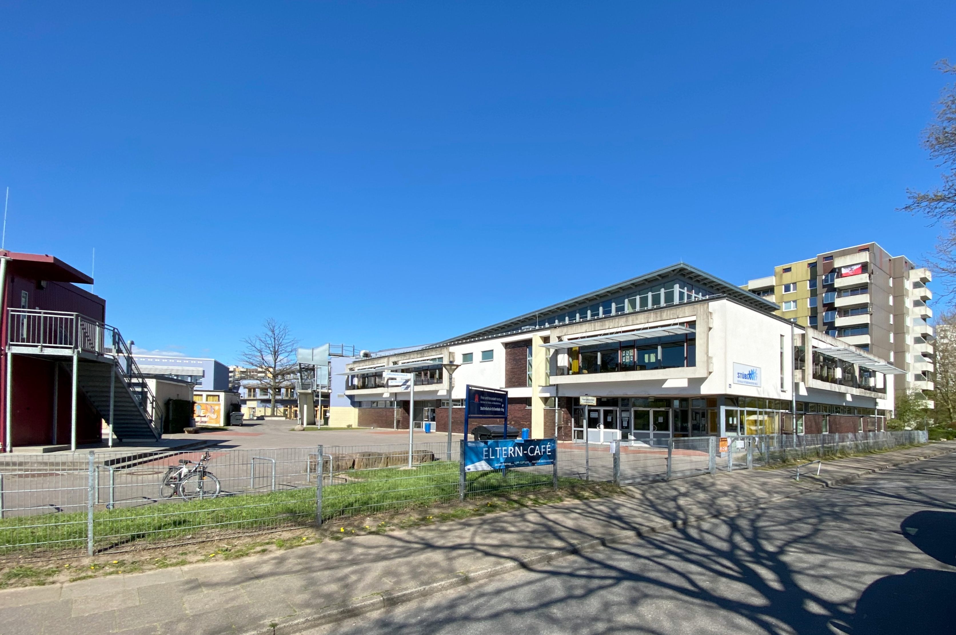 Stadtteilschule Stübenhofer Weg in Hamburg-Wilhelmsburg